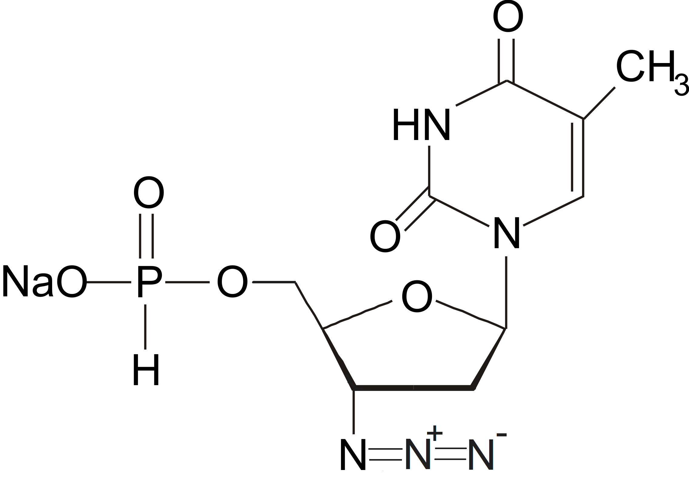 Структурная формула фосфазида